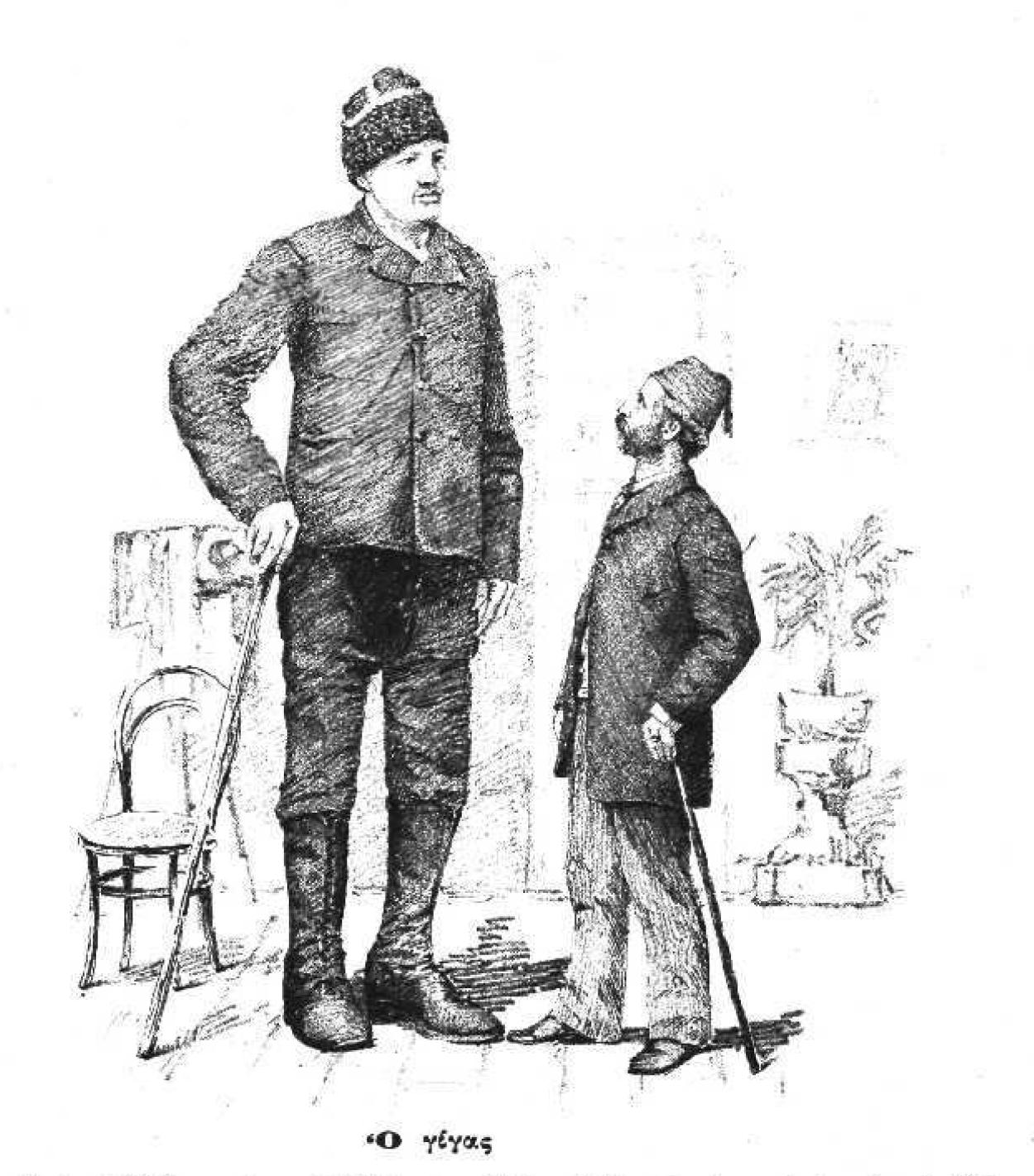 griechischer Riese, 19. Jahrhundert